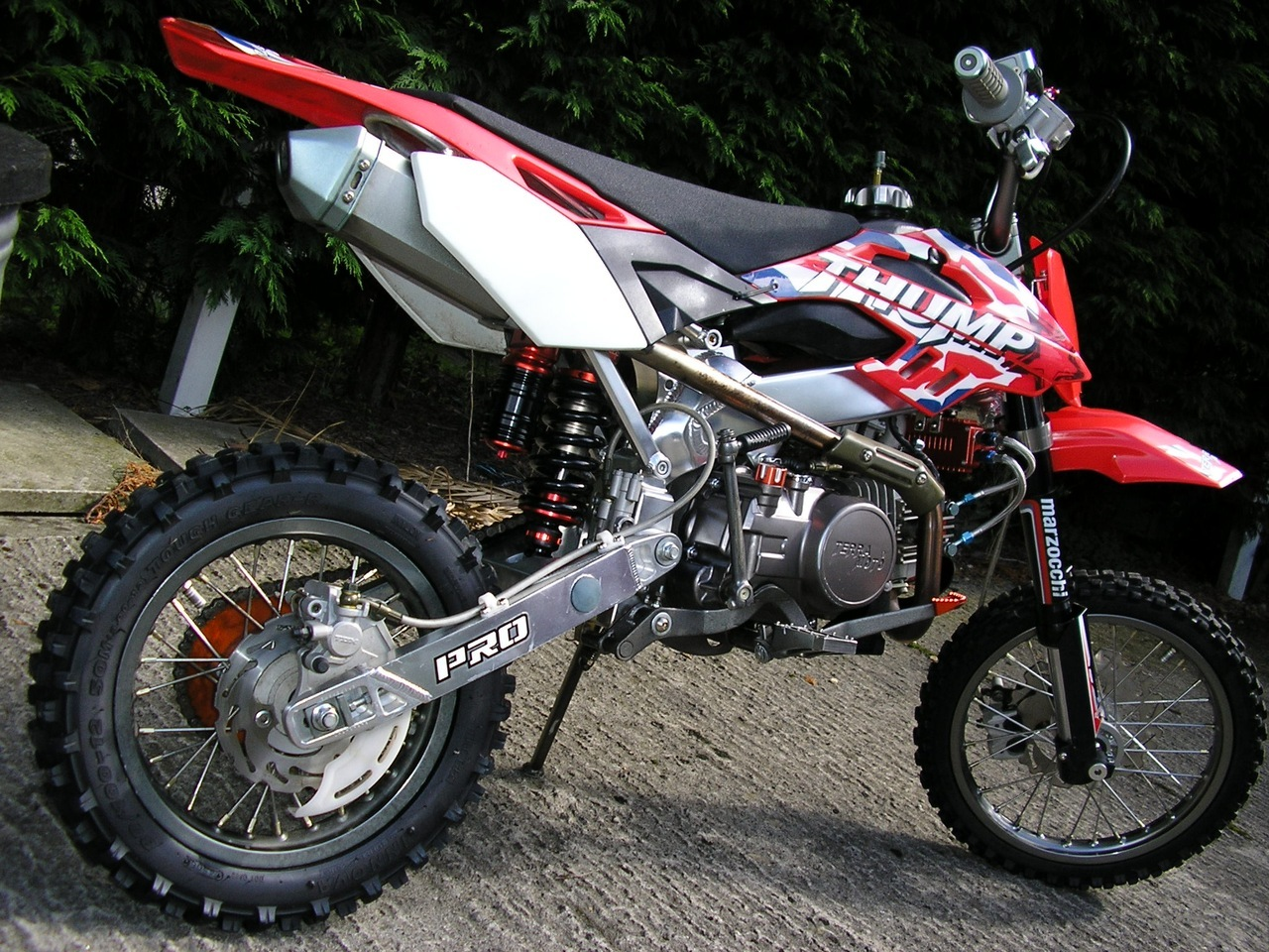 Питбайк